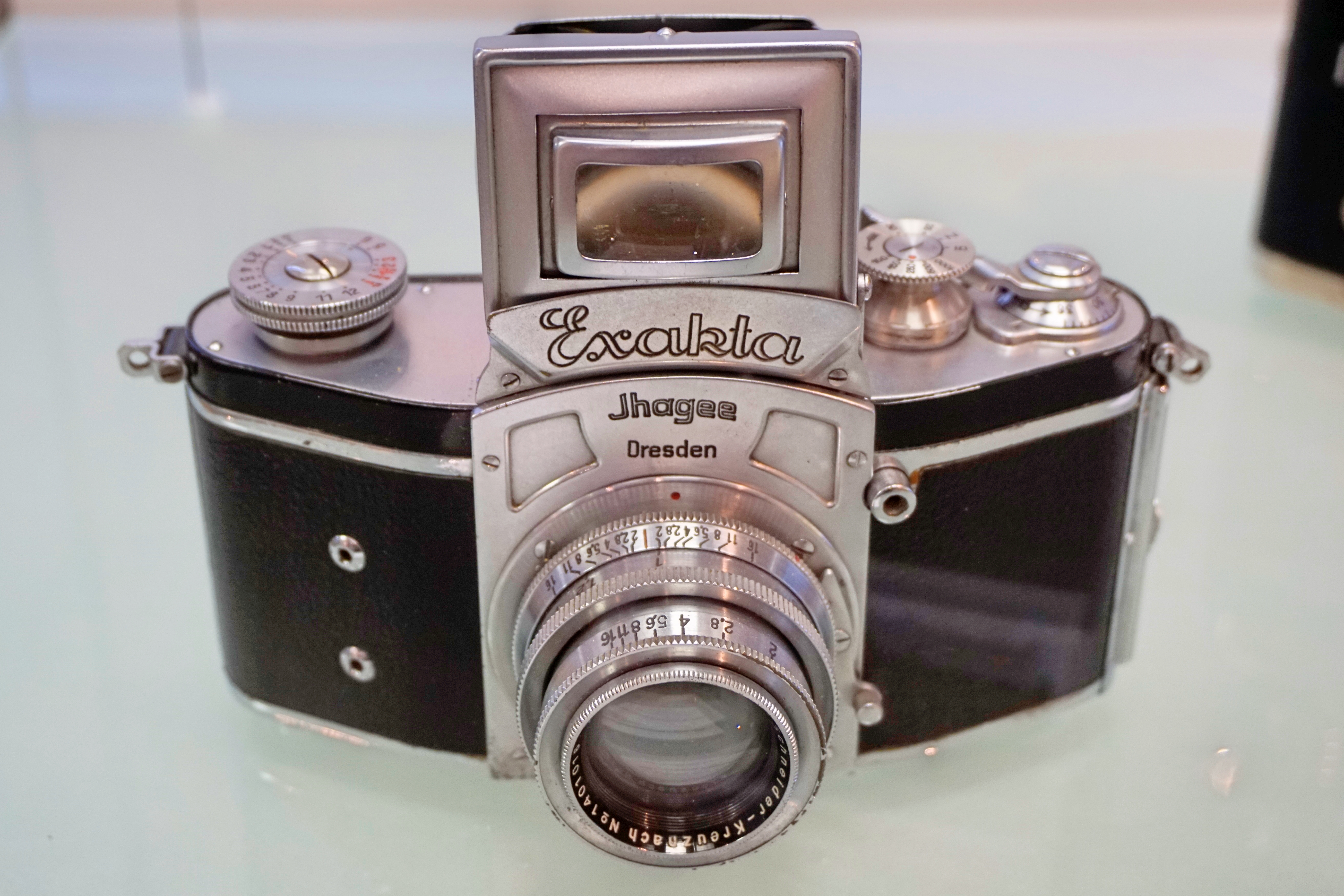 Kine Exakta, 1936 Format; 24x36 mm, Exaktar 3,5/54 Wechselobjektive mit Bajonett Gummituch-Schlitzverschluss 12 s - 1/10 s, 1/25 s - 1/1000 s Produktionszeitraum 1936 - 1943, 1945 - 1950 in Modellvarianten Ihagee Kamera-Werk Steenbergen & Co